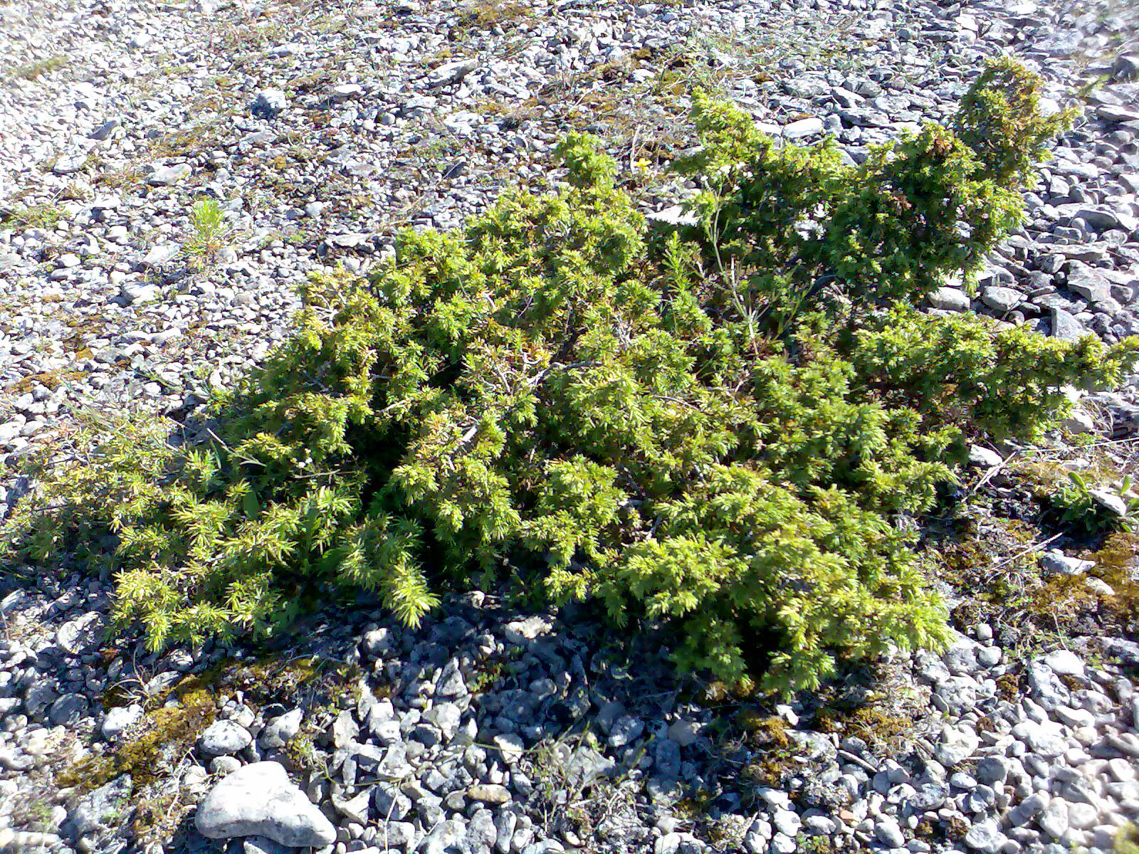 Juniperus communis alpina